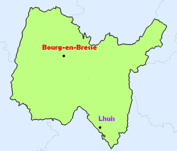 Carte de localisation de Lhuis